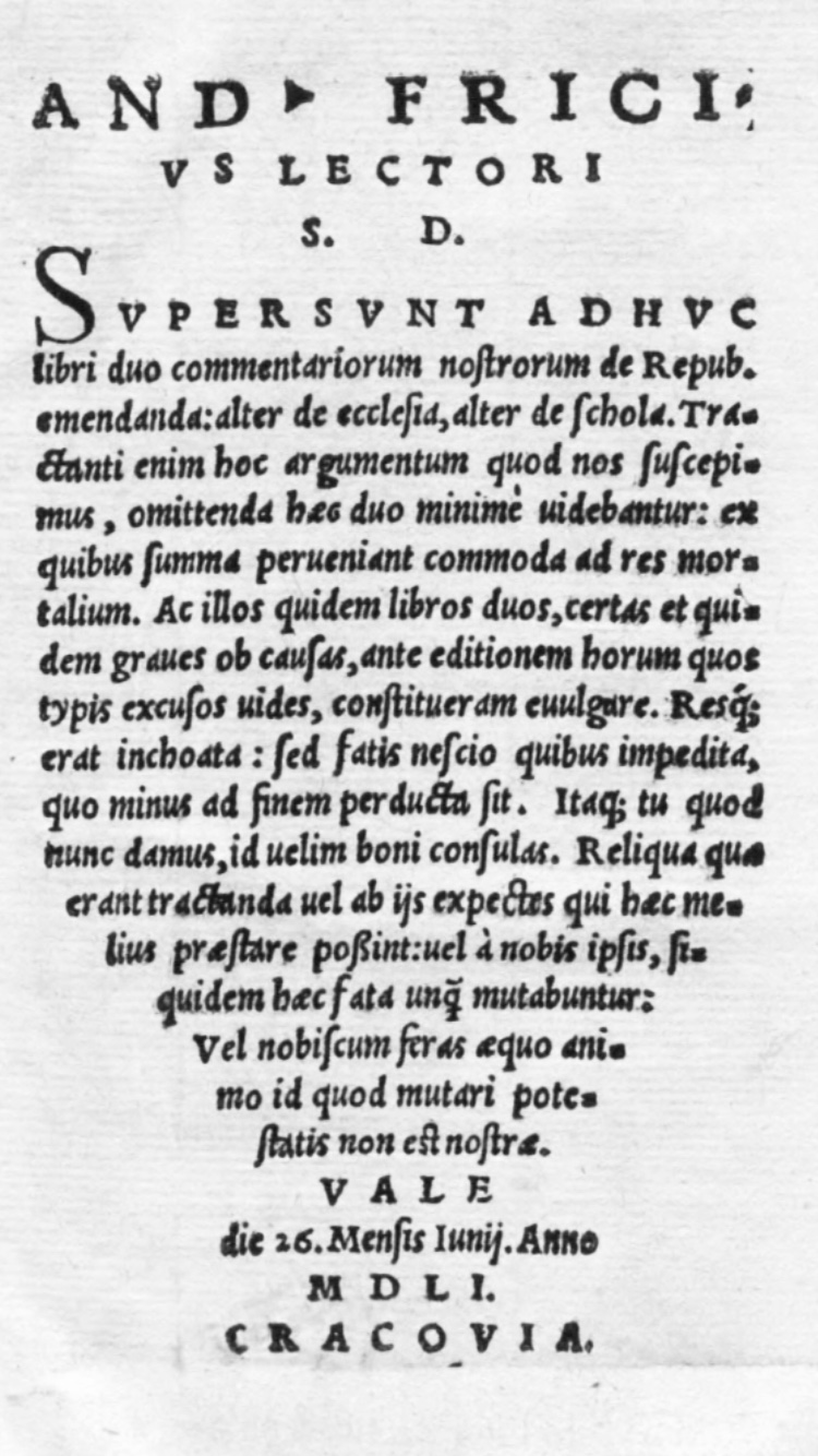 Ostatnia strona pierwodruku De Republica Emendanda z 1551.